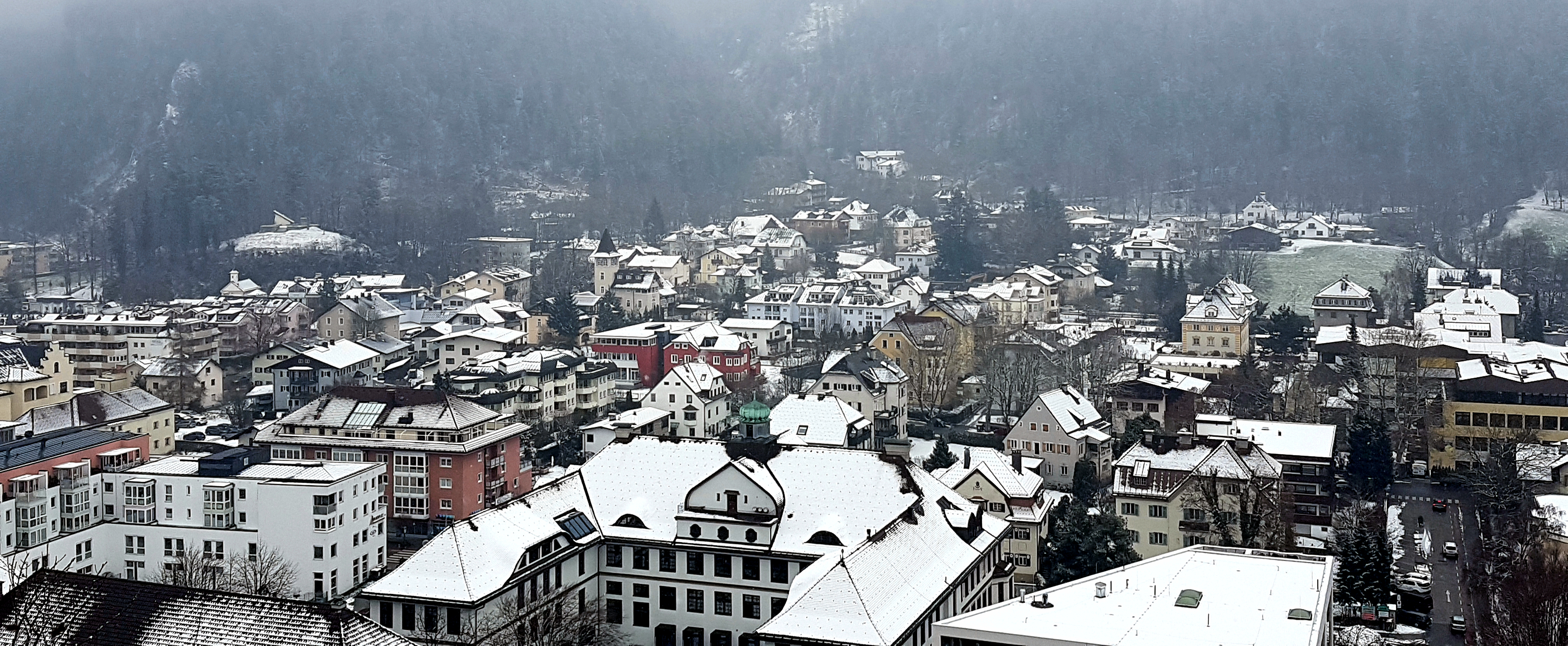 Der Kufsteiner Stadtteil Kienbichl von der Festungsbastei aus fotografiert.